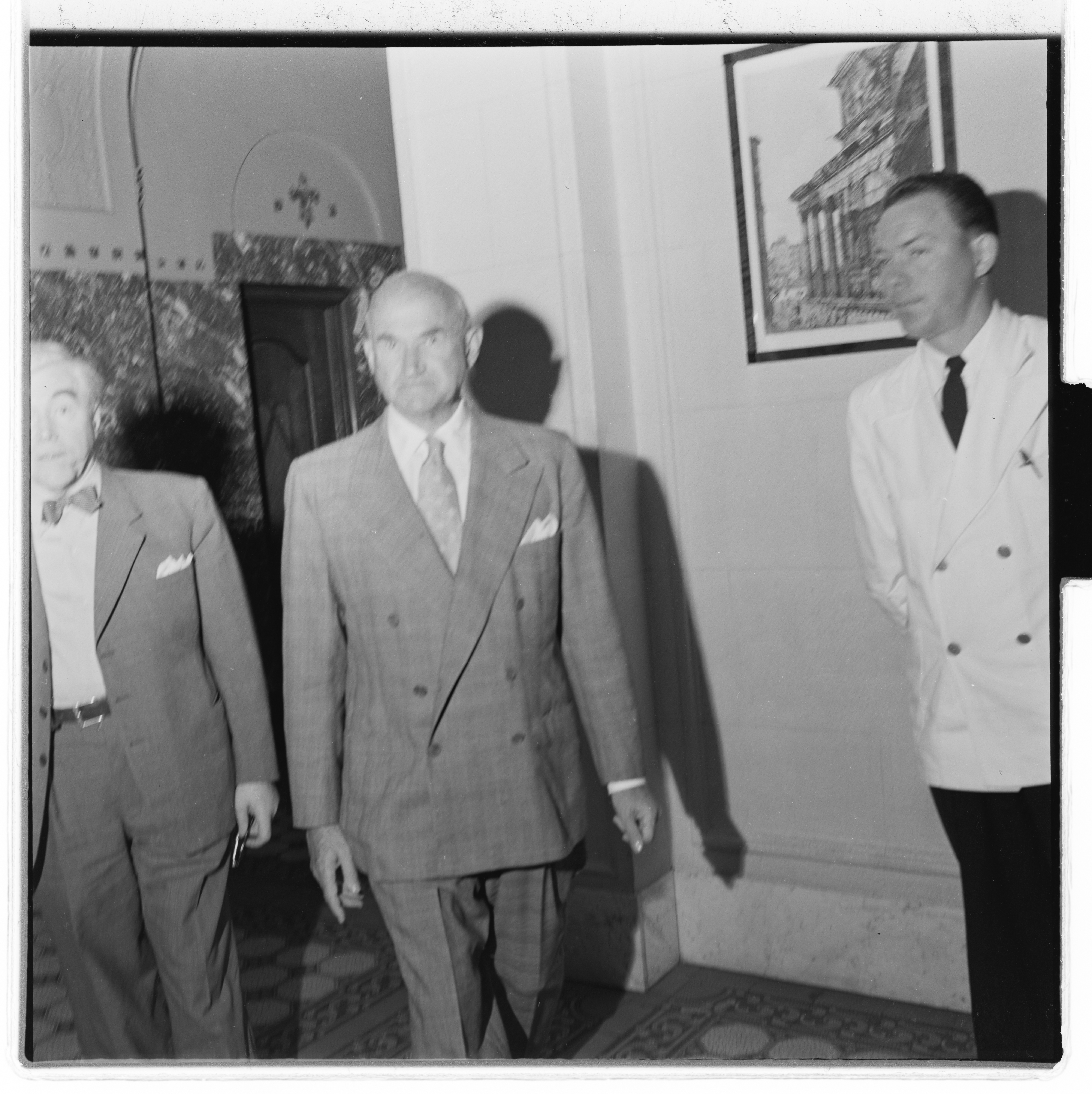 Bildet er hentet fra Arkivverket. Samuel Goldwyn Arkivinstitusjon : Riksarkivet Arkivnavn : Billedbladet NÅ Sted : Norge, Ukjent, Ukjent, Emneord: Film, Filmskaper, Filmprodusent Avbildet